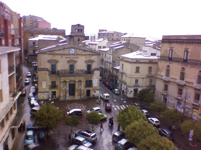 Enna city centre and theatre covered by snow-Il teatro ed il centro storico di Enna copeti dalla neve